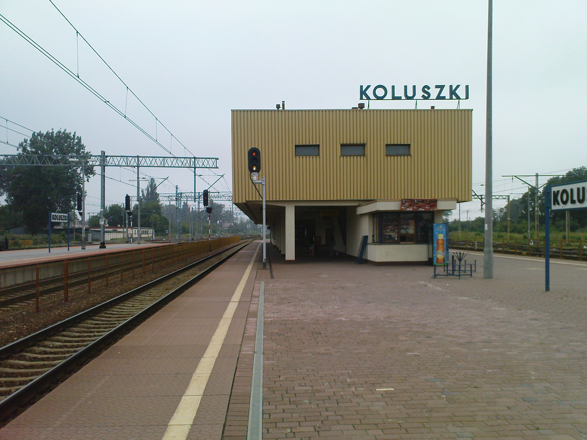 Dworzec w Koluszkach.